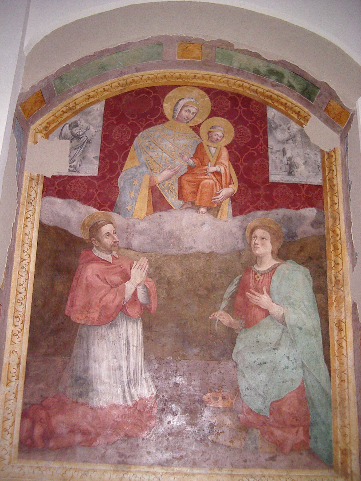 Ascensidonio Spacca - Madonna di Constantinopoli - Bevagna - Italie